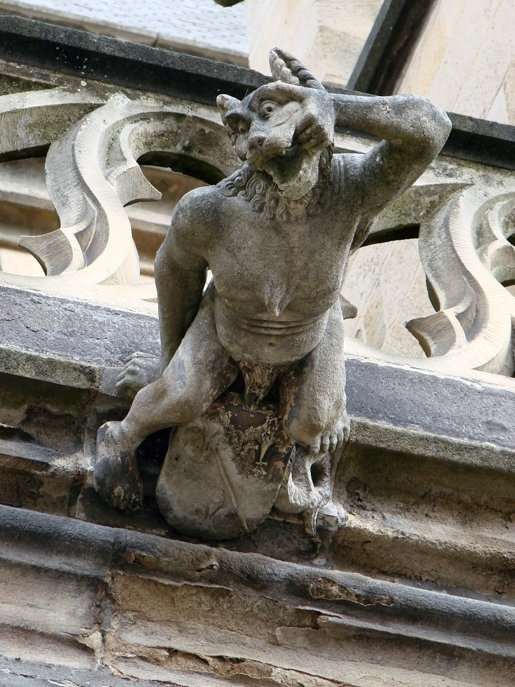 Gargouille de la cathédrale Notre-Dame de l'Annonciation de Moulins. Loup-garou (?).